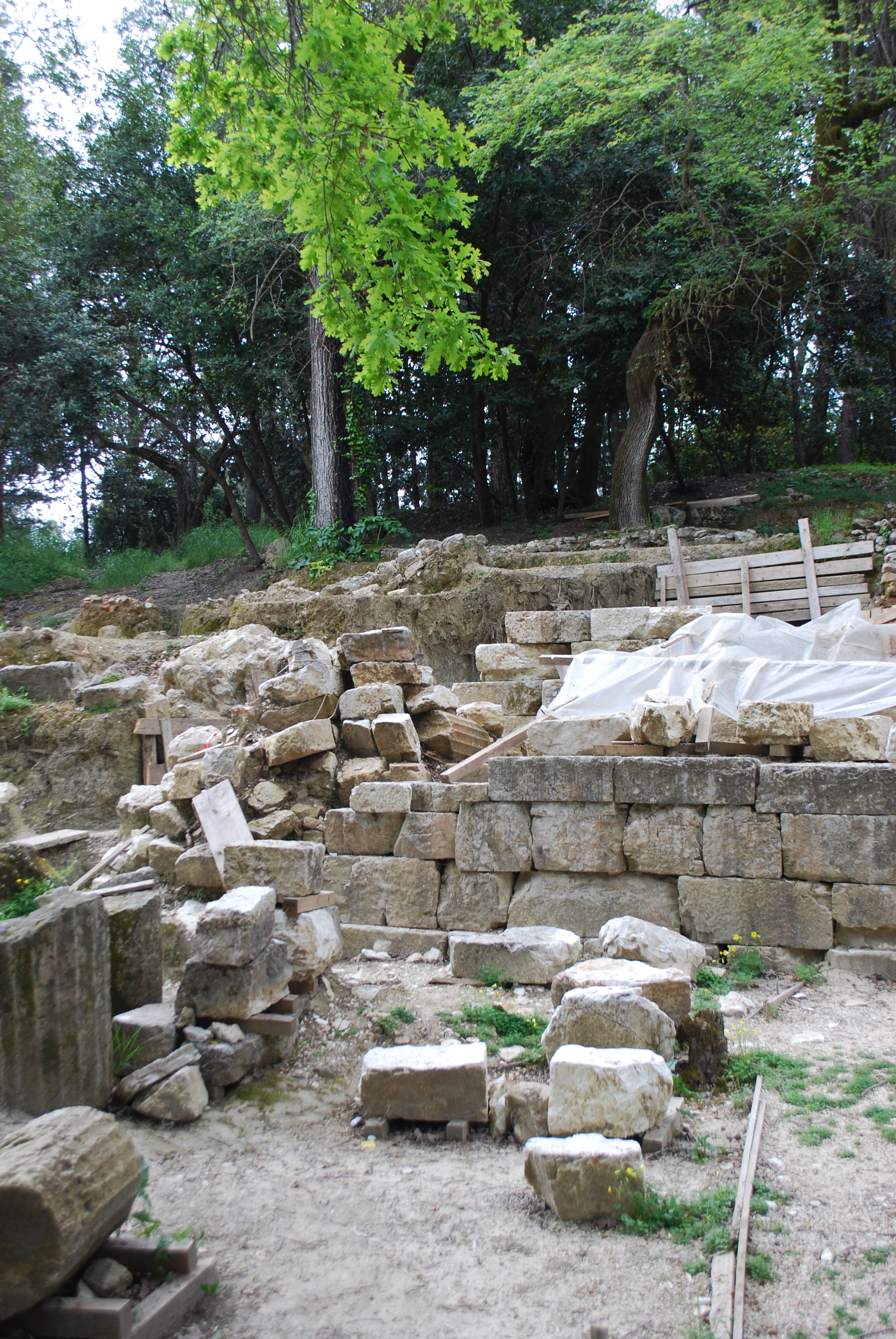 Vue du site archéologique de Paleopoli à Corfou.